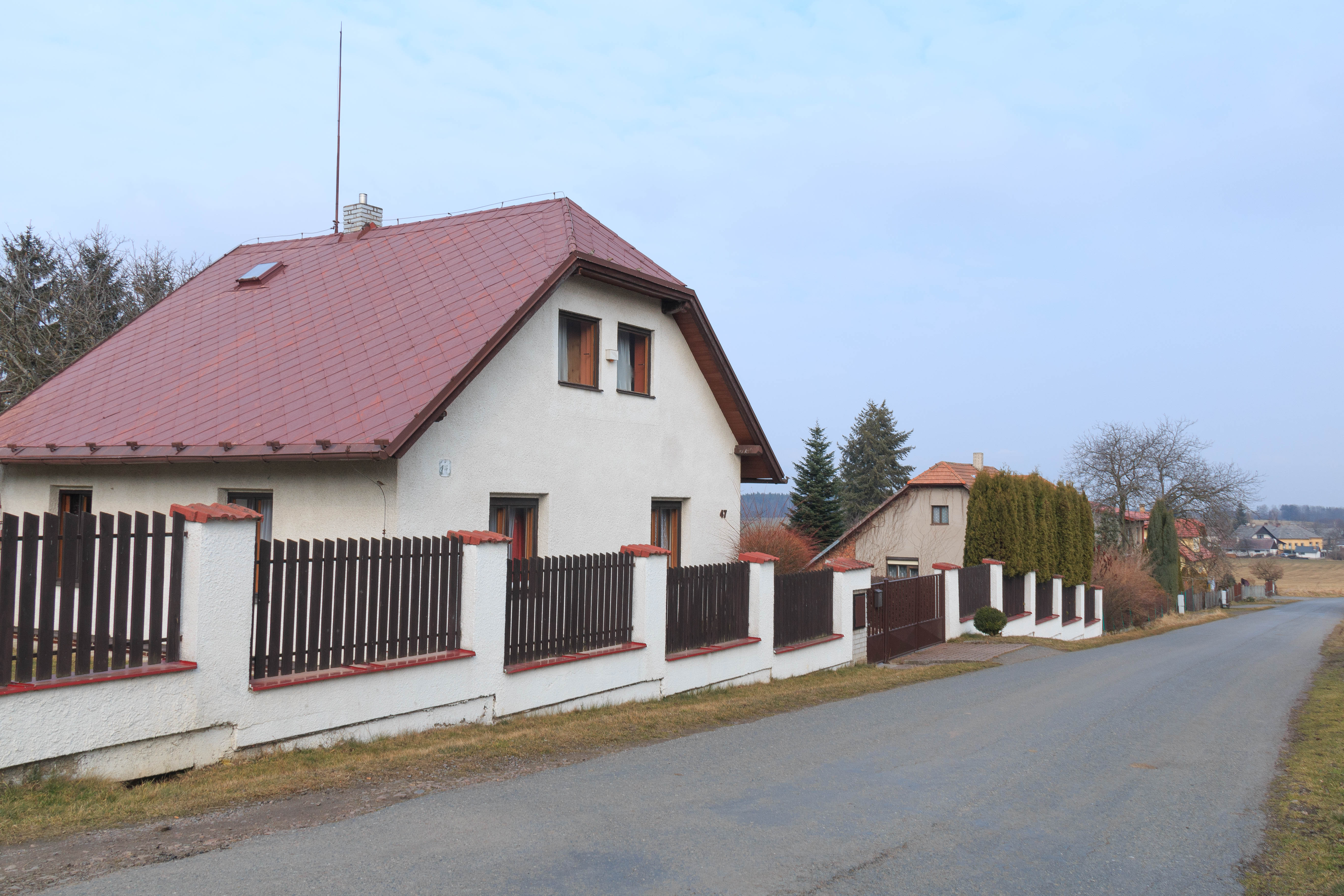 Švihůvek čp. 47